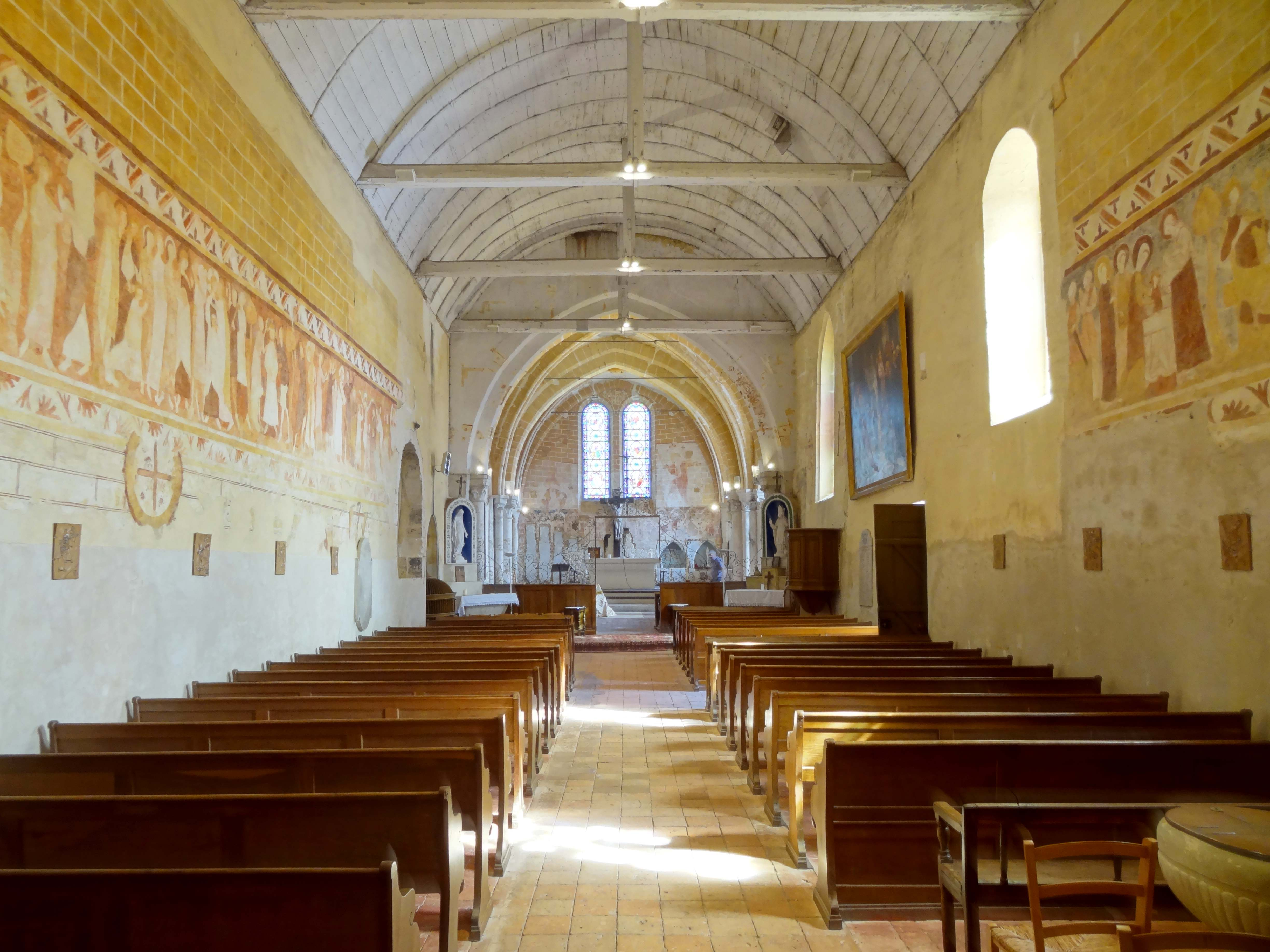 Intérieur de l'église - voir titre.